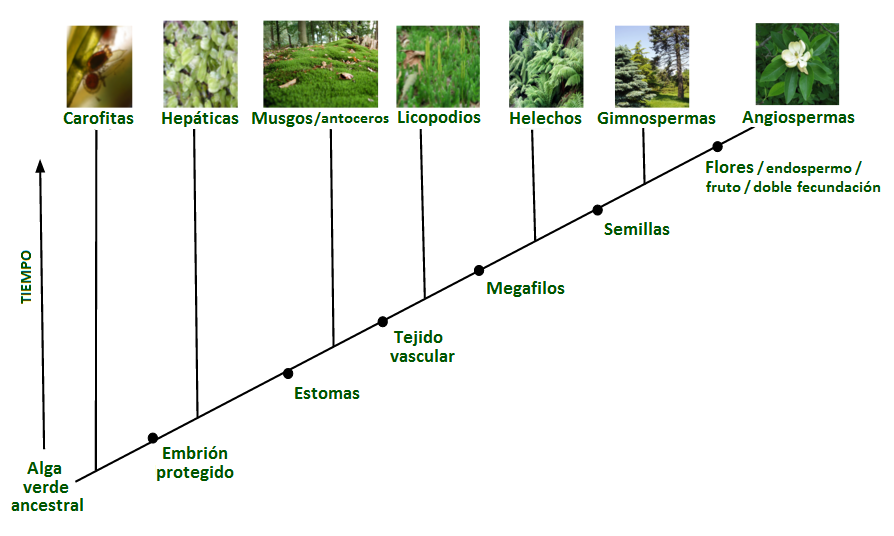 Cladograma evolutivo de las plantas terrestres.